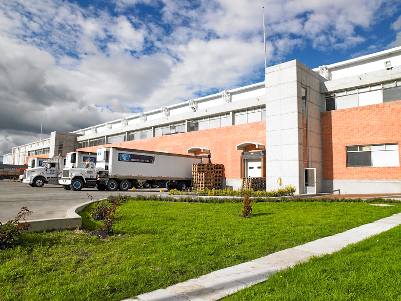 Imagen de la fabrica de alpina bogotá, Colombia